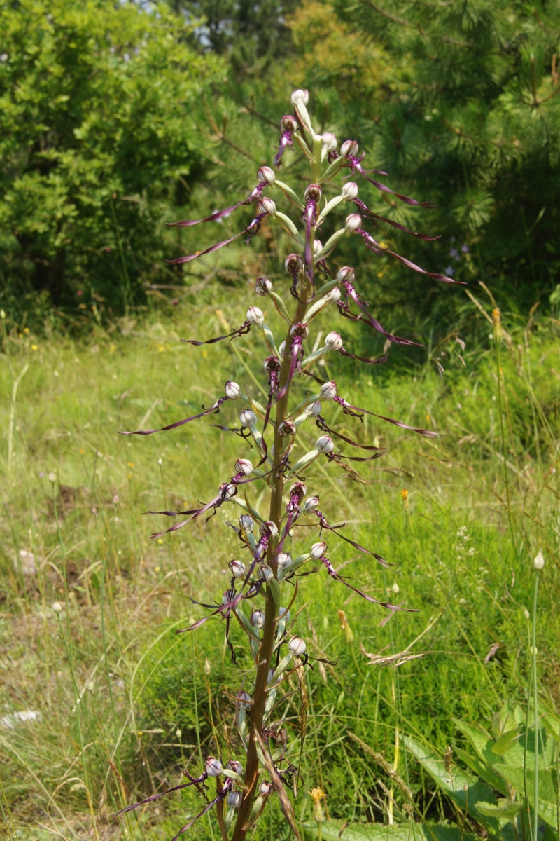 Jadranska smrdljiva kukavica v Črnem Kalu.